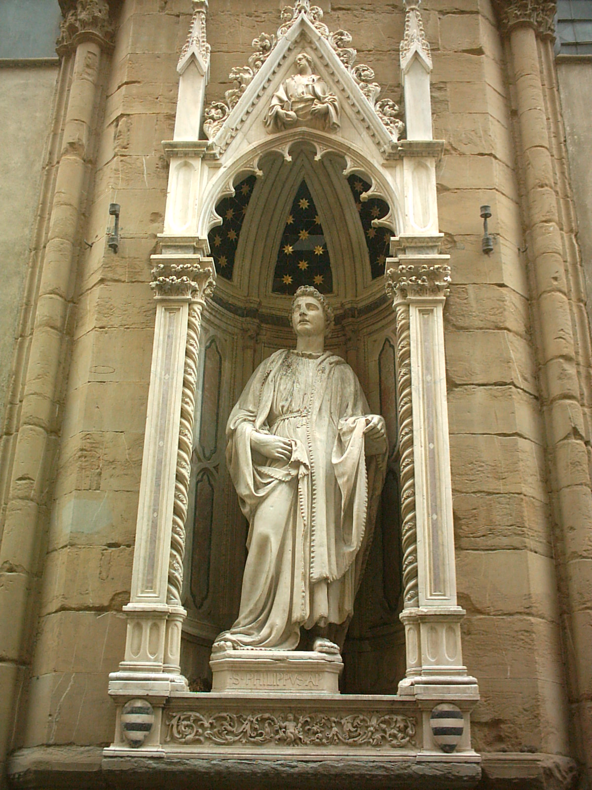 Statua in marmo di San Filippo eseguita per l'arte dei calzolai da Nanni di Banco nel 1410-12 nel tabernacolo della chiesa di Orsanmichele a Firenze